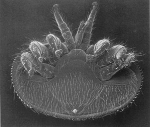 Bauchseite einer gesunden Varroamilbe